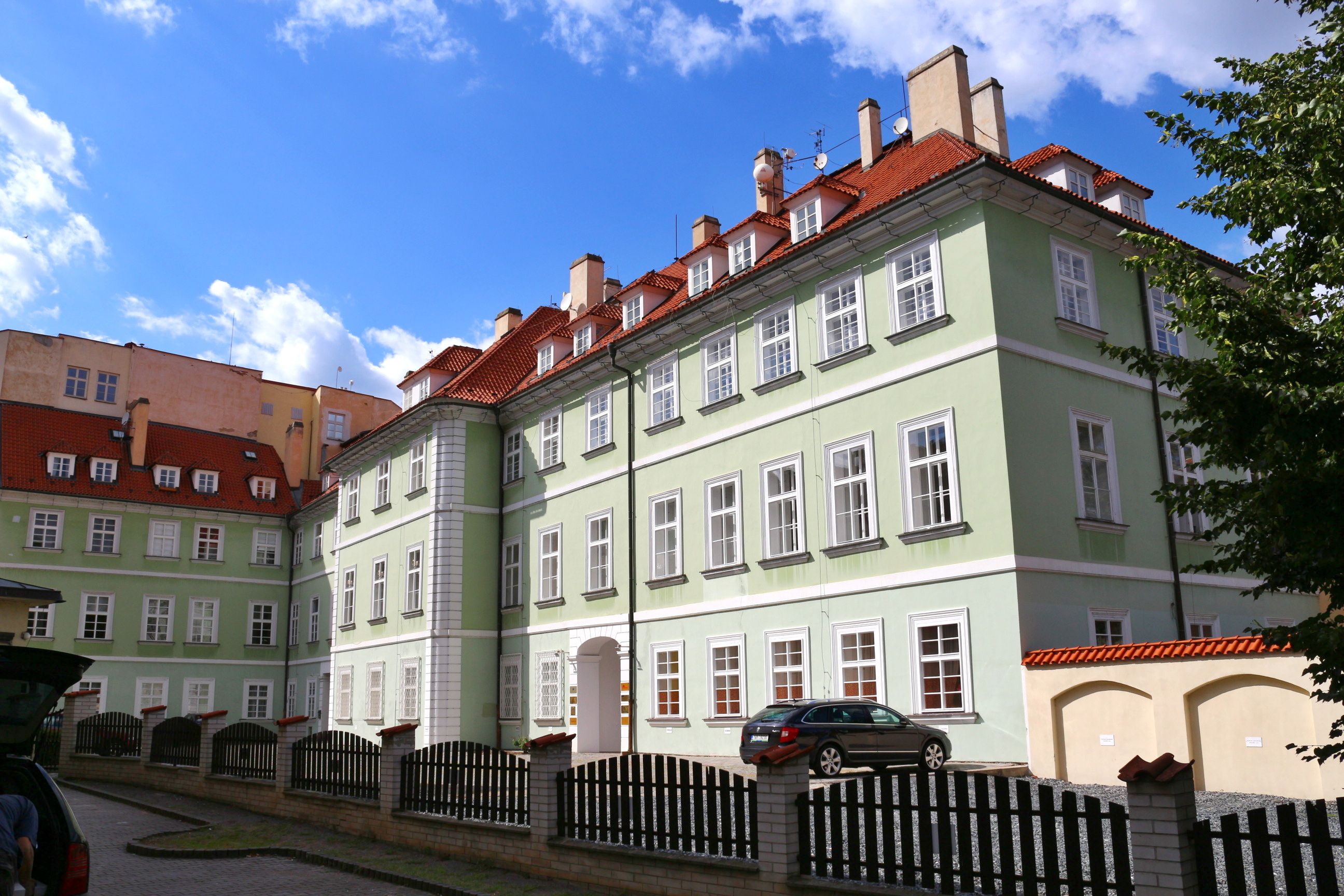 Chotkův palác na Malé Straně